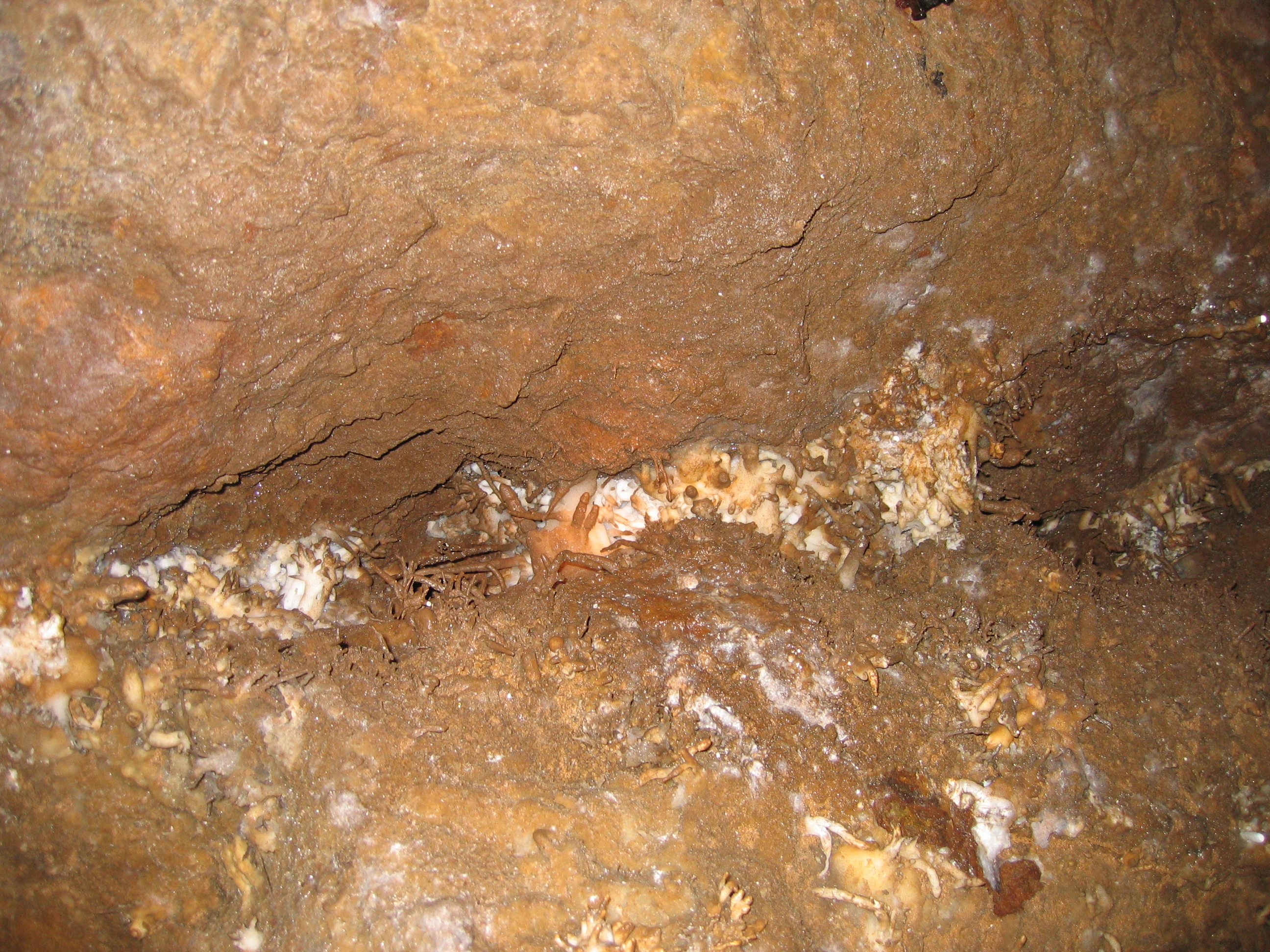 Aggertalhöhle in Engelskirchen-Ründeroth